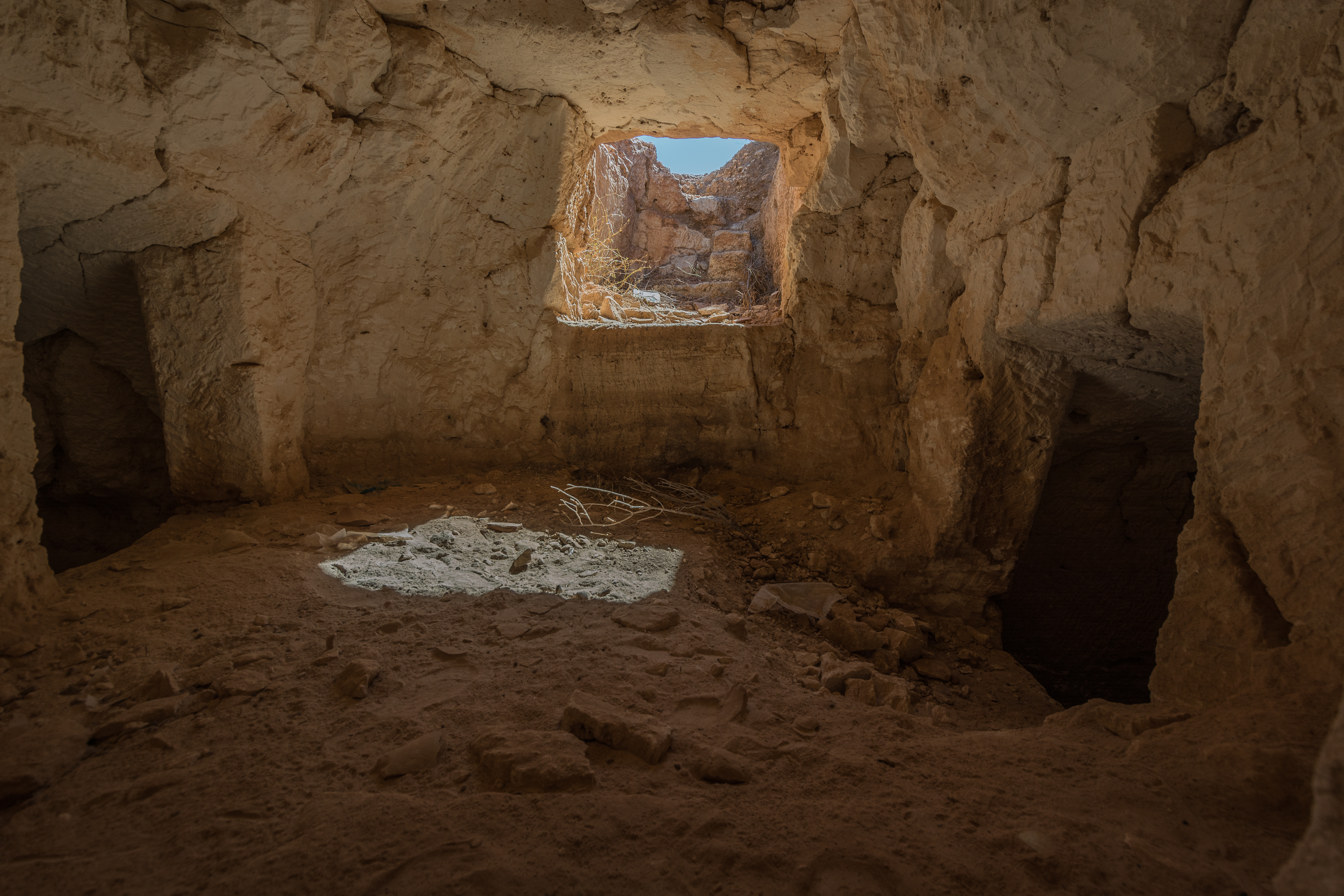 Hypogée mesurant 12 mètres sur 7 mètres au nord des ruines